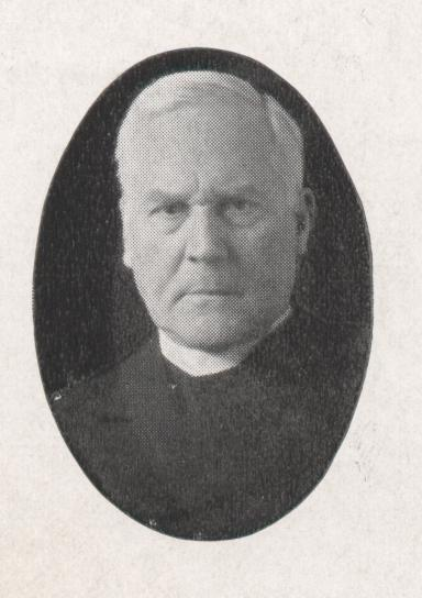 Dr. Eduard Weigl, Priester und Professor der Fundamentaltheologie, München